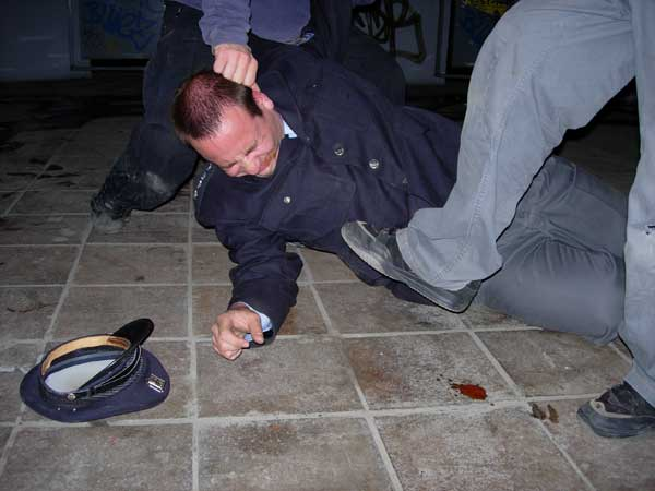 captain